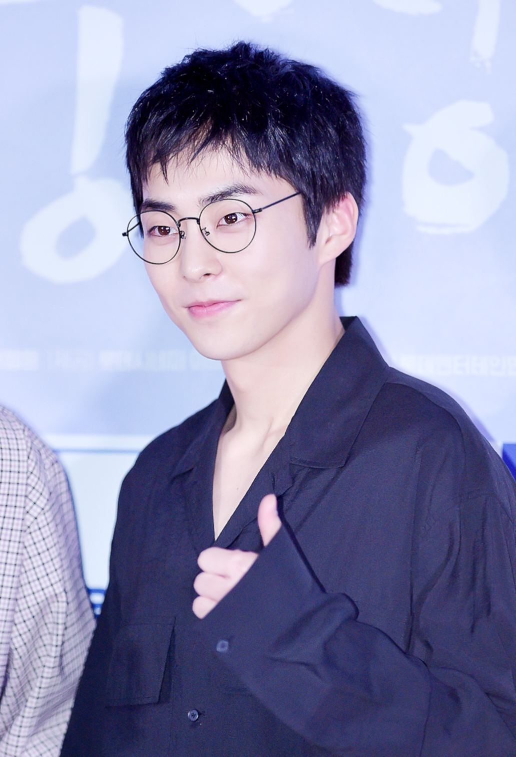 180611 여중생A VIP시사회